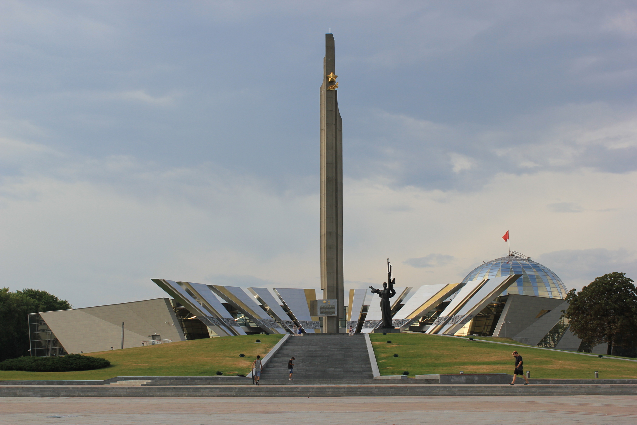 Minsk; Museum des Großen Vaterländischen Krieges.